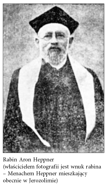 הרב ד"ר אהרון הפנר Aron Heppner